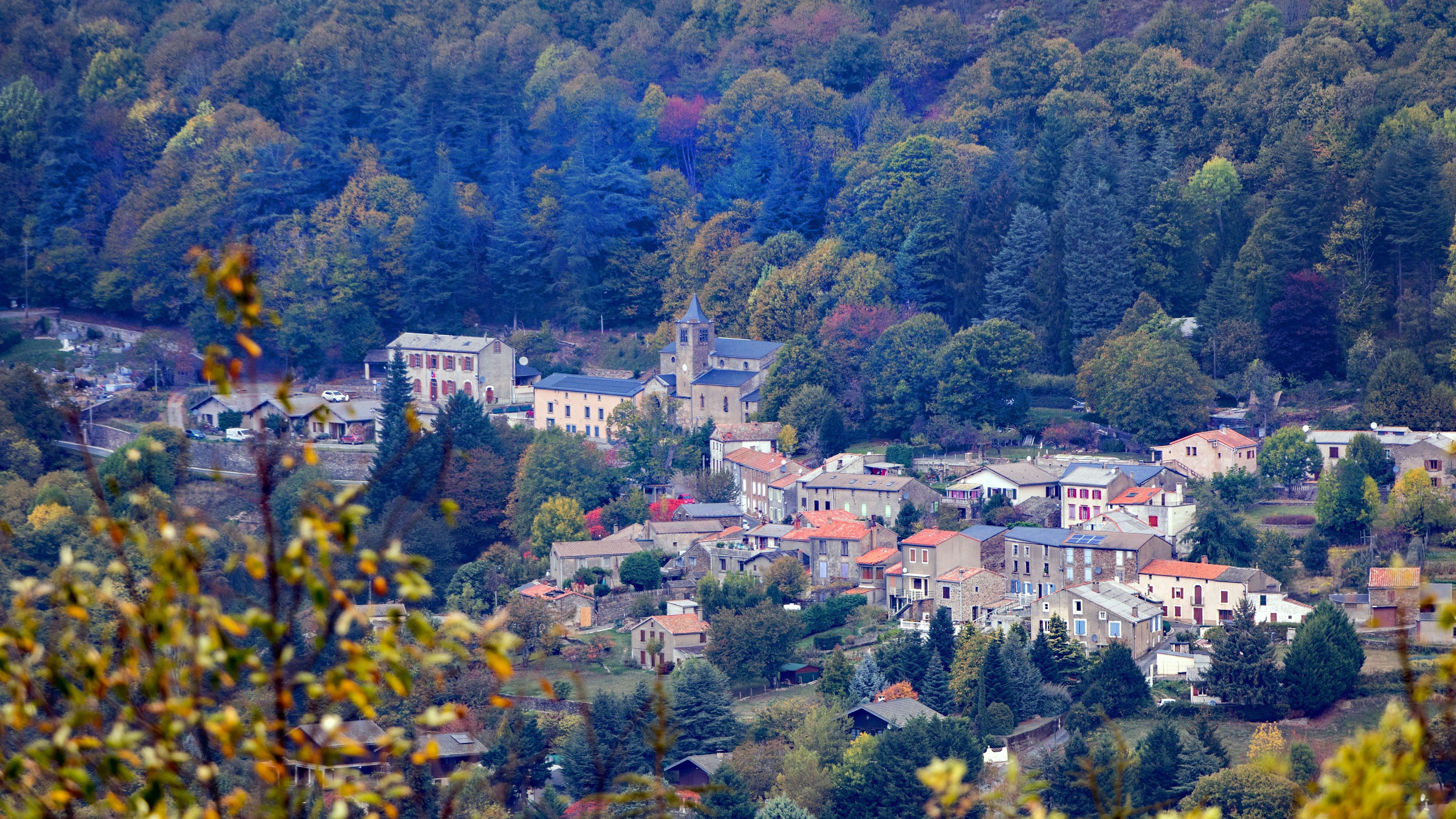 Laviale